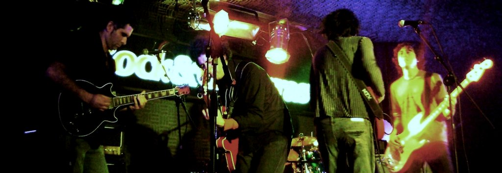 12. Septiembre. 08